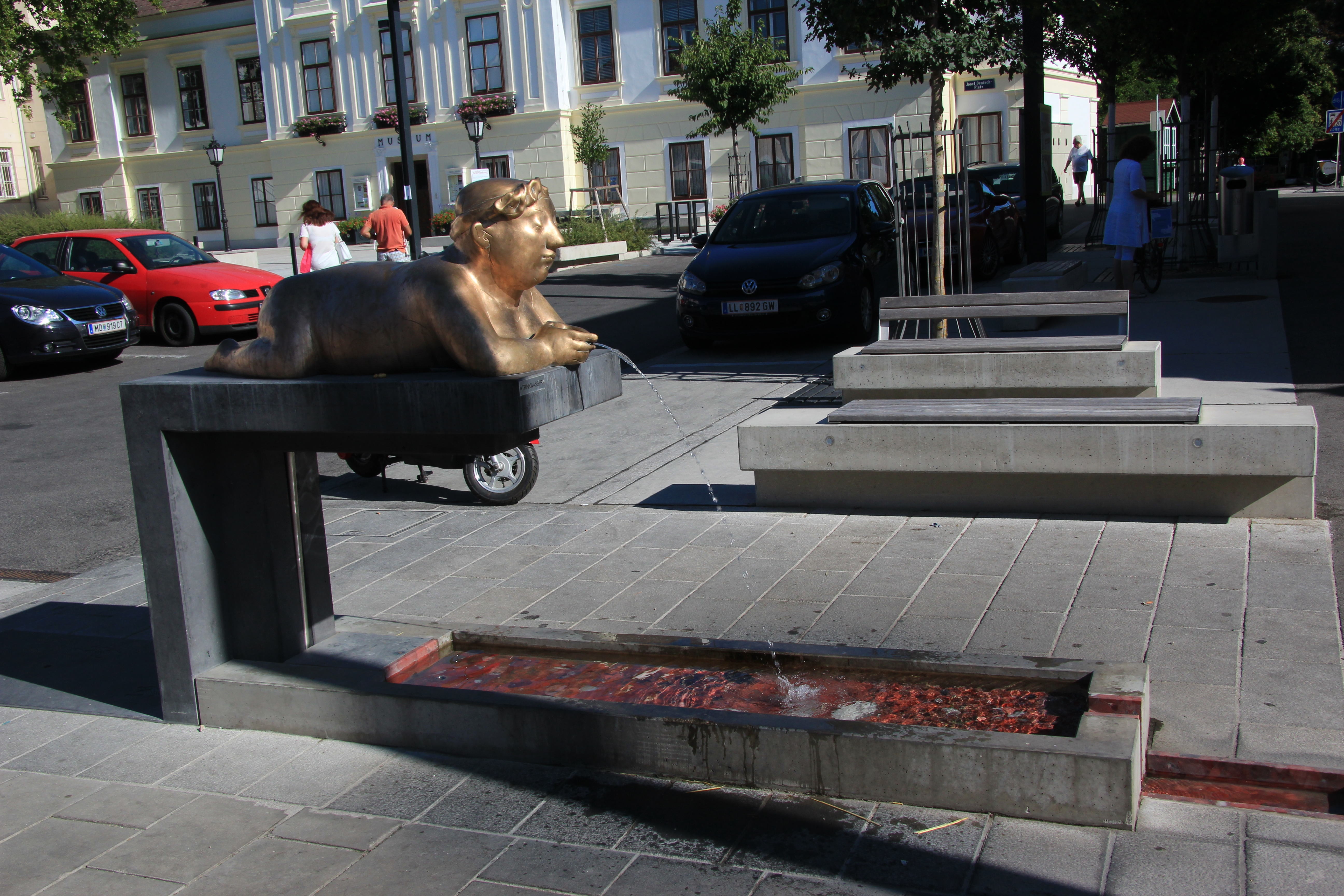 Brunnen vor dem Museum Mödling, Niederösterreich, dargestellt ist die Brunnennymphe Medilihha von Gundi Dietz